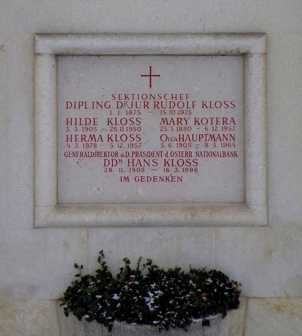 Feuerhalle Simmering - Urnenhain (Abteilung MR) - Familie Kloss